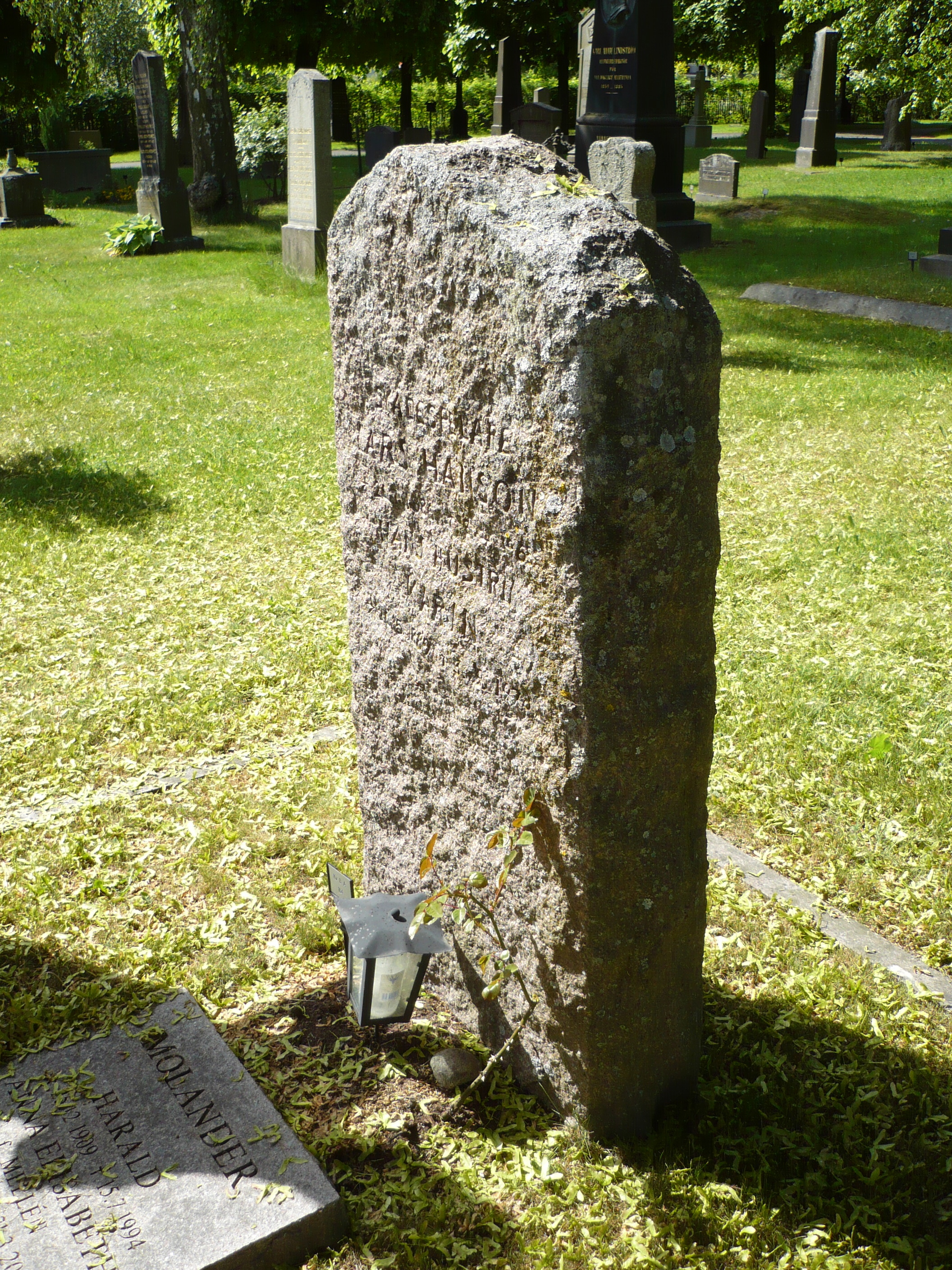 Grav för Lars Hanson och Karin Molander på Norra kyrkogården i Solna.